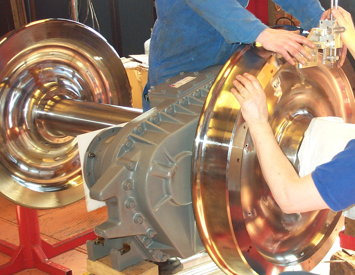 Instrumentering av mäthjul för järnvägsfordon, bilden är tagen i Hagalund 2004